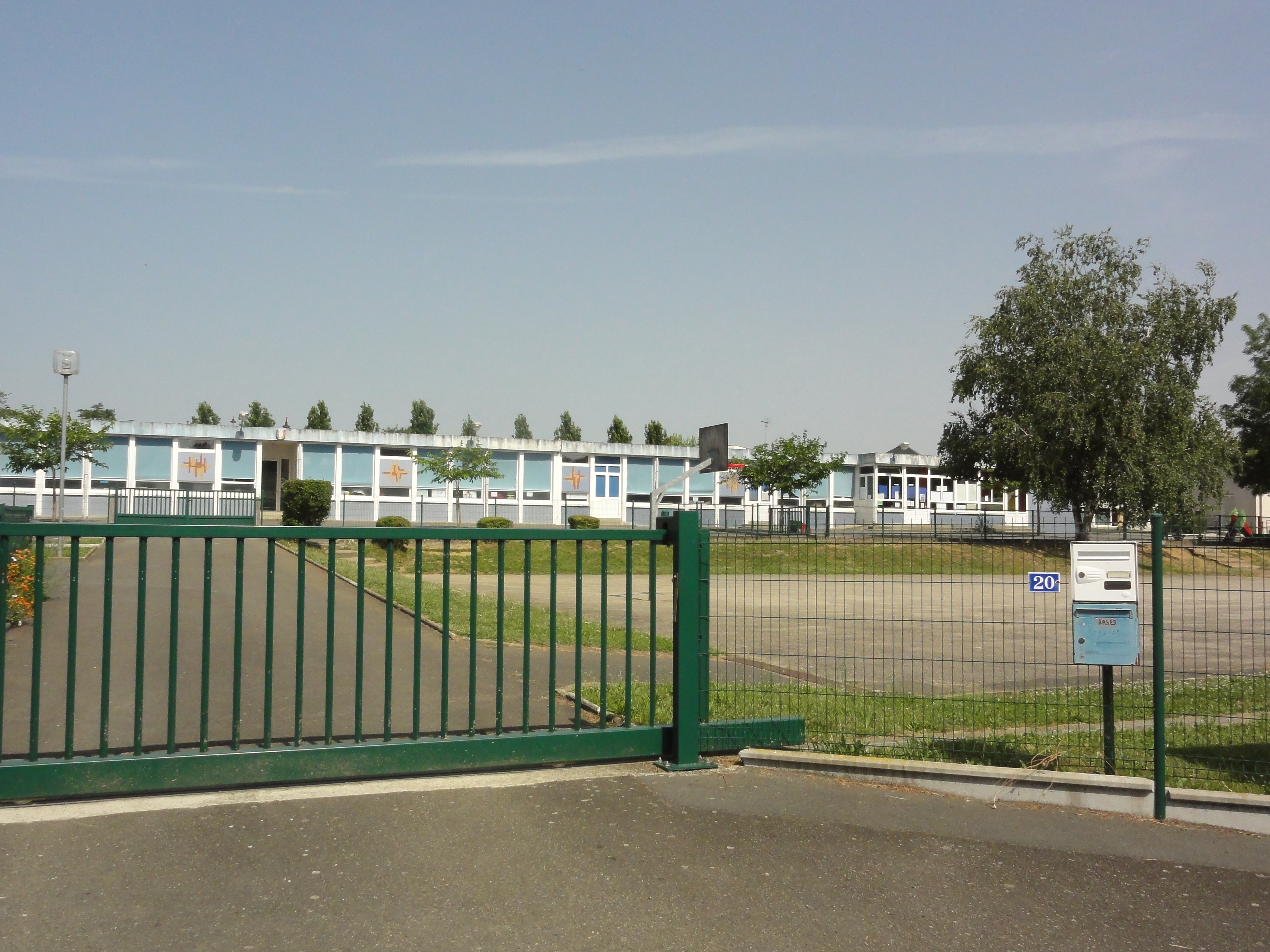 Montbizot (Sarthe) école